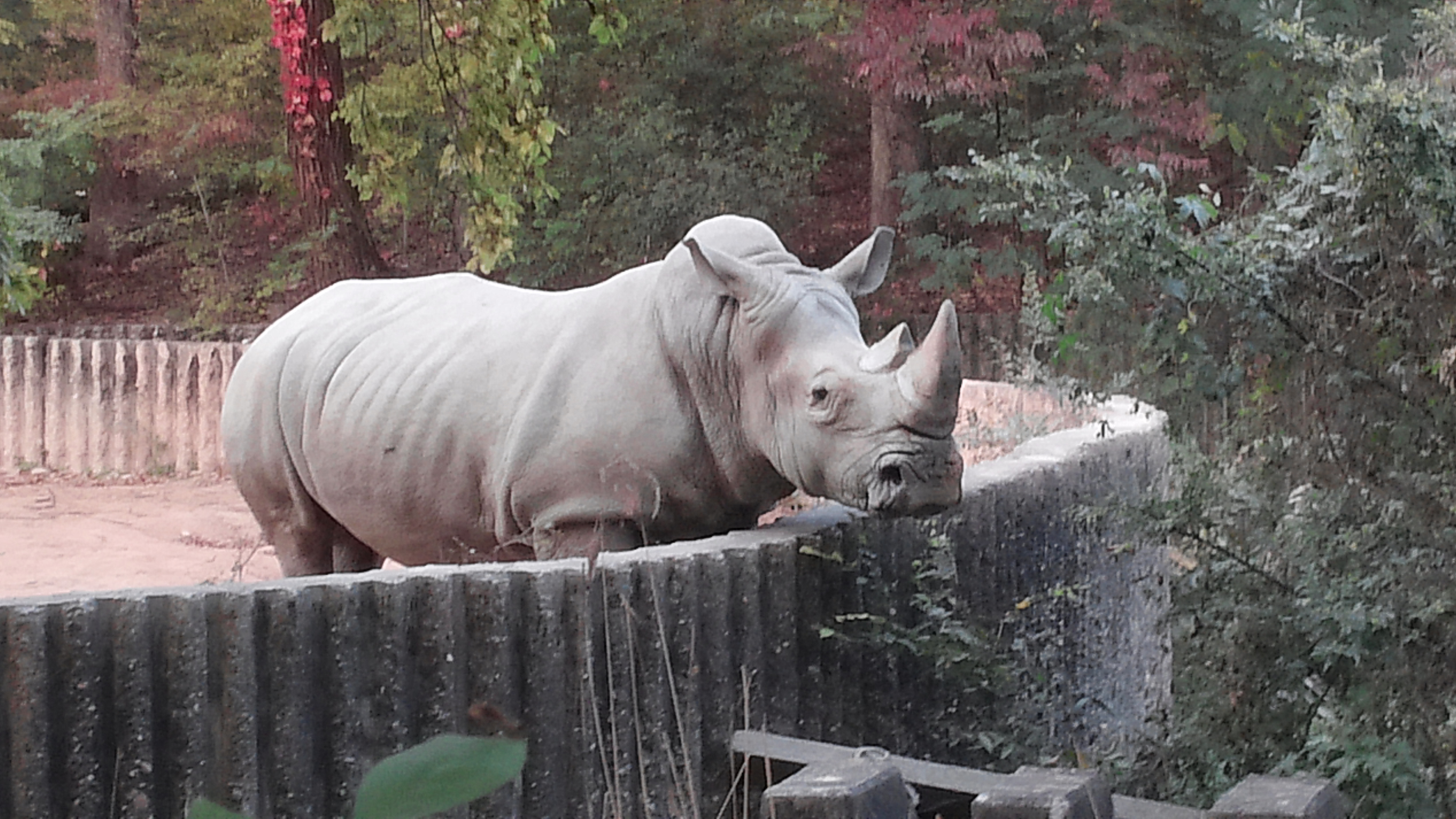 White rhinoceros in Seoul Grand Park